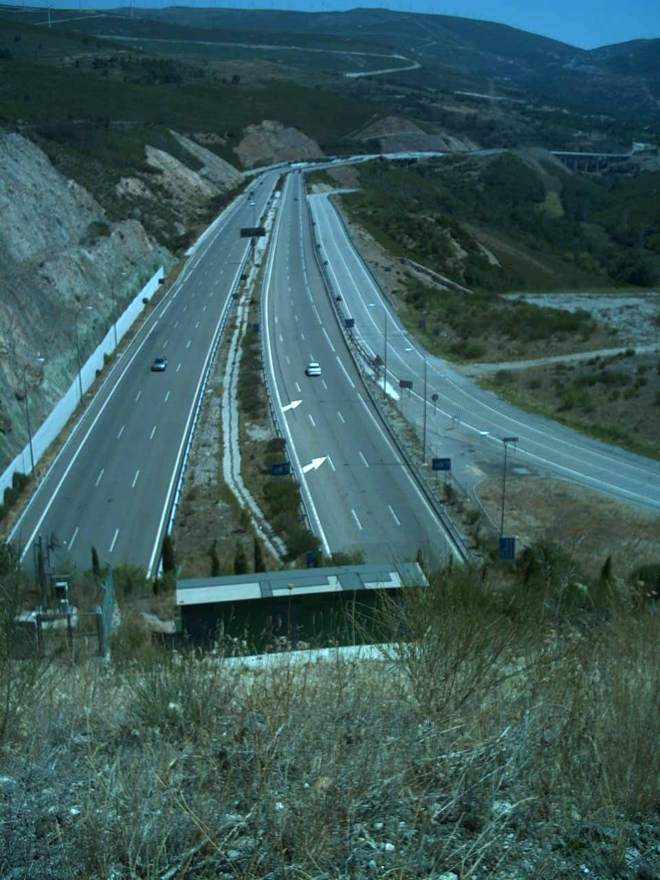 Tramo de la A-52 anterior a la entrada por el lado de Zamora al Túnel de La Canda. Tomada 2005-08-11